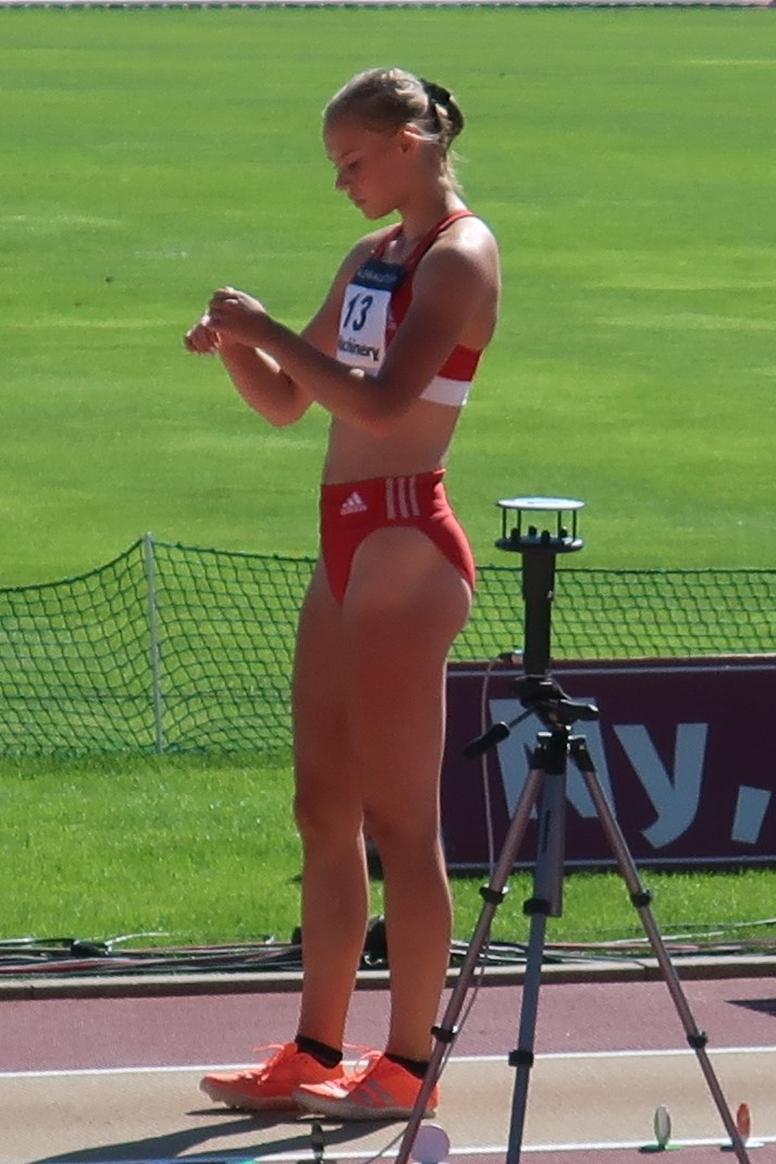 Saga Vanninen valmistautumassa seitsenottelun pituushyppysuoritukseensa Kalevan kisoissa 2020.